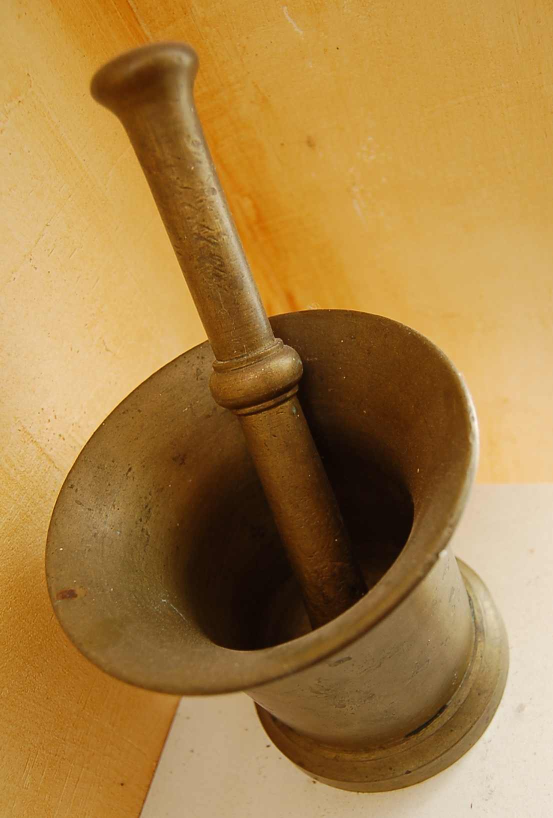 Mortier et Pilon - Mortar and pestle